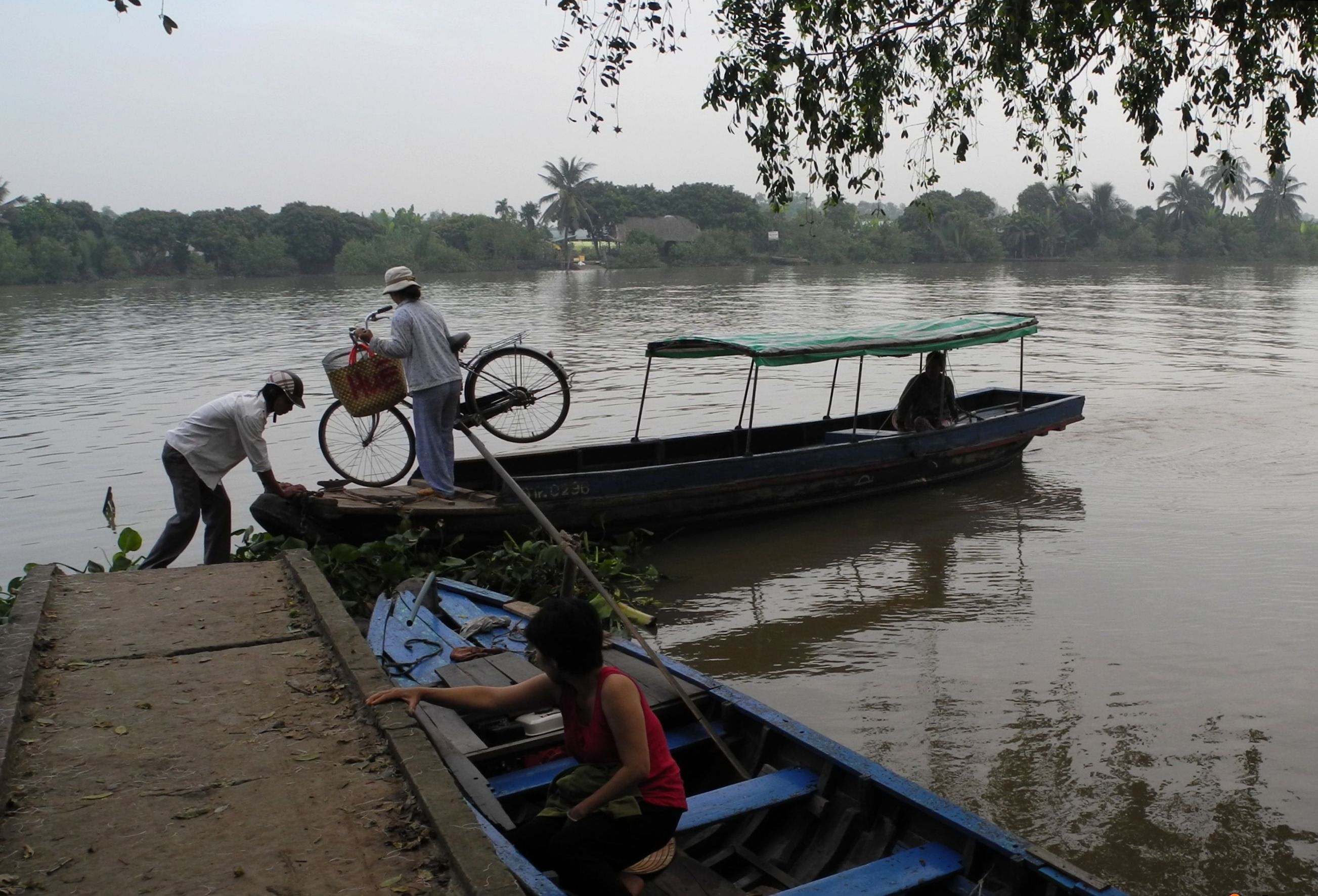 Ben Tre-Radler geht von der Fähre,Mekong